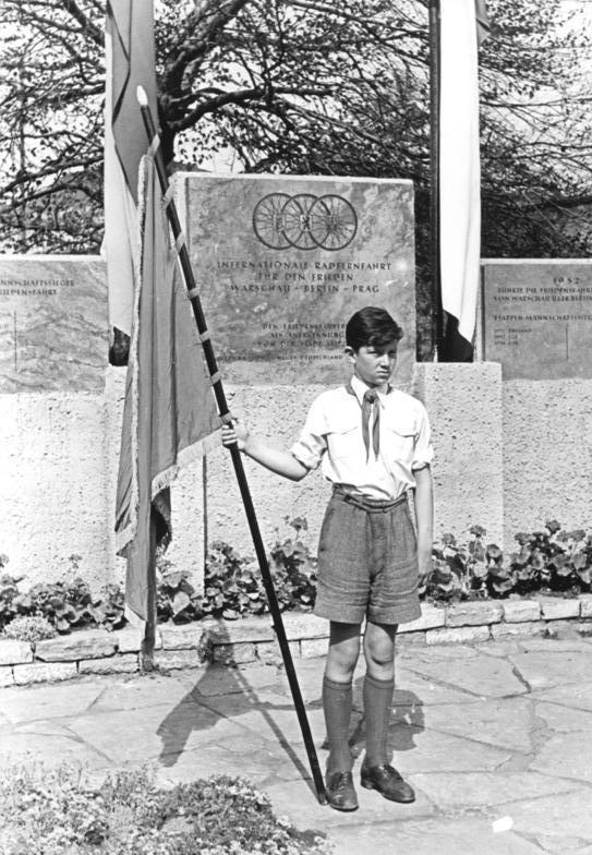 Leipzig, Ehrenmal der Friedensfahrt Zentralbild Illner 11.5. 1954 6. Internationale Friedensfahrt Mai 1954 Warschau - Berlin - Prag Ein Ehrenmal der Internationalen Friedensfahrt wurde am Ruhetag nach der Etappe Berlin - Leipzig am 10. Mai 1954 in Leipzig enthüllt. Auf dem Ehrenmal der Friedensfahrt sind die Namen der Einzelsieger und die Sieger der Mannschaftswertung eingemeißelt. UBz: Fahnenwache der Jungen Pioniere vor dem enthüllten Ehrenmal, das in Anerkennung der Leistungen vom Rat der Stadt Leipzig erbaut wurde.